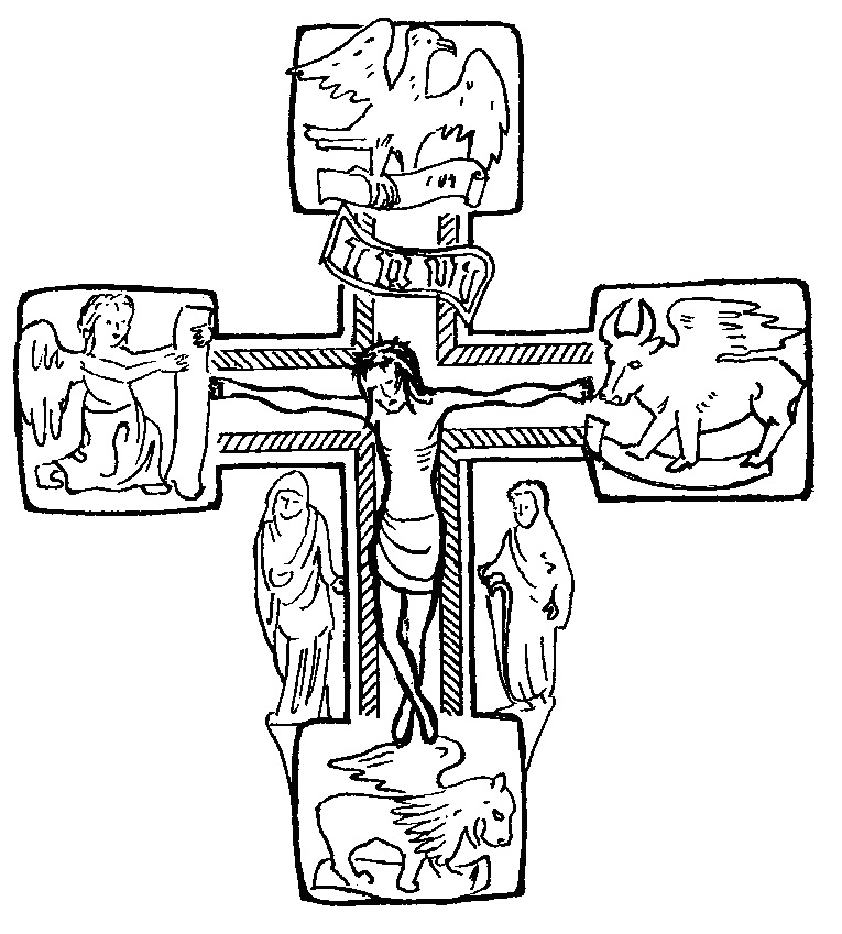 Elisabethkreuz. Seit 1983 Zeichen der Hochkirchlichen St.-Johannes-Bruderschaft (SJB). Das Kreuz hat eine Voder- und eine Rückseite. Die eine ist für Sonn- und Festtage, die andere für festlose Zeiten.